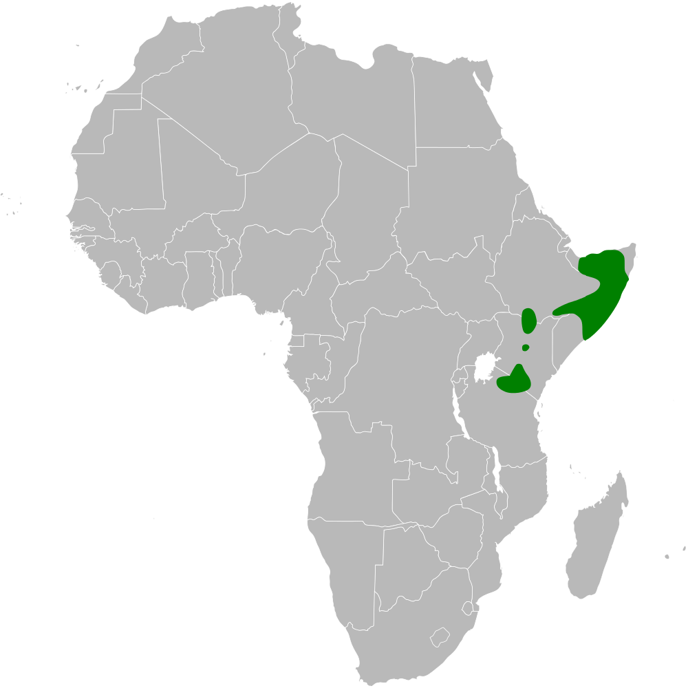 Pseudalaemon fremantlii distribution map, based on